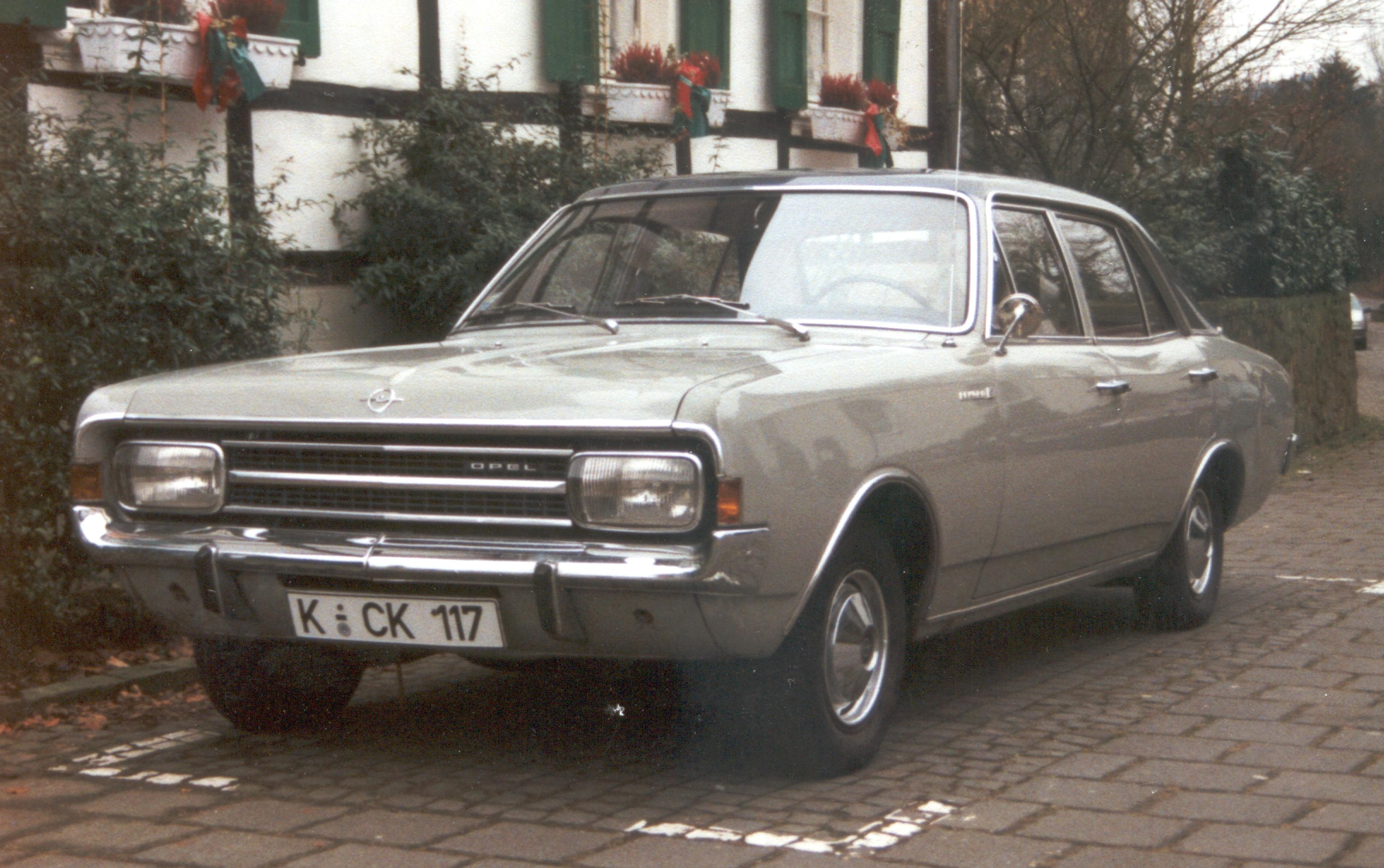 Opel_Rekord_C_1-7_L_zwei